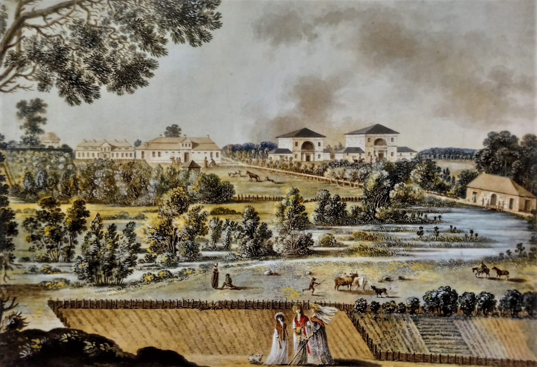 Беларуская (тарашкевіца): Паставы (Pastavy), сядзіба Тызэнгаўзаў (Tyzenhaus)